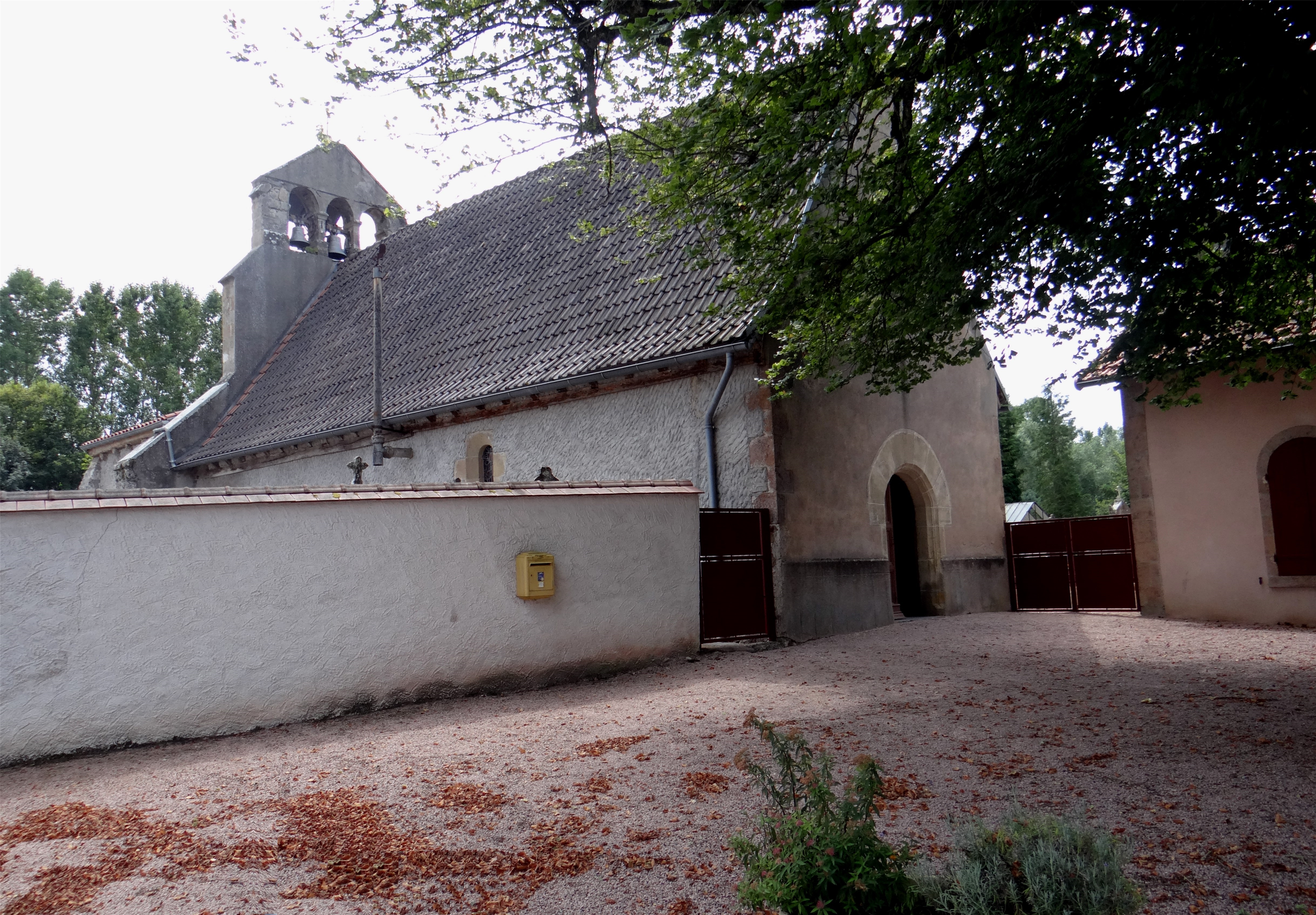 Église Saint Jean, Servilly, Allier, France.